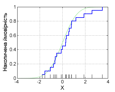 Це є унаочненням емпіричної функції розподілу. Сірий стовпчики показують зразки, які відповідають їй, а зелена лінія є теоретичним розподілом, з якого було витягнуто ці зразки.